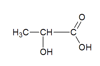 Forme semi développée de l'acide lactique